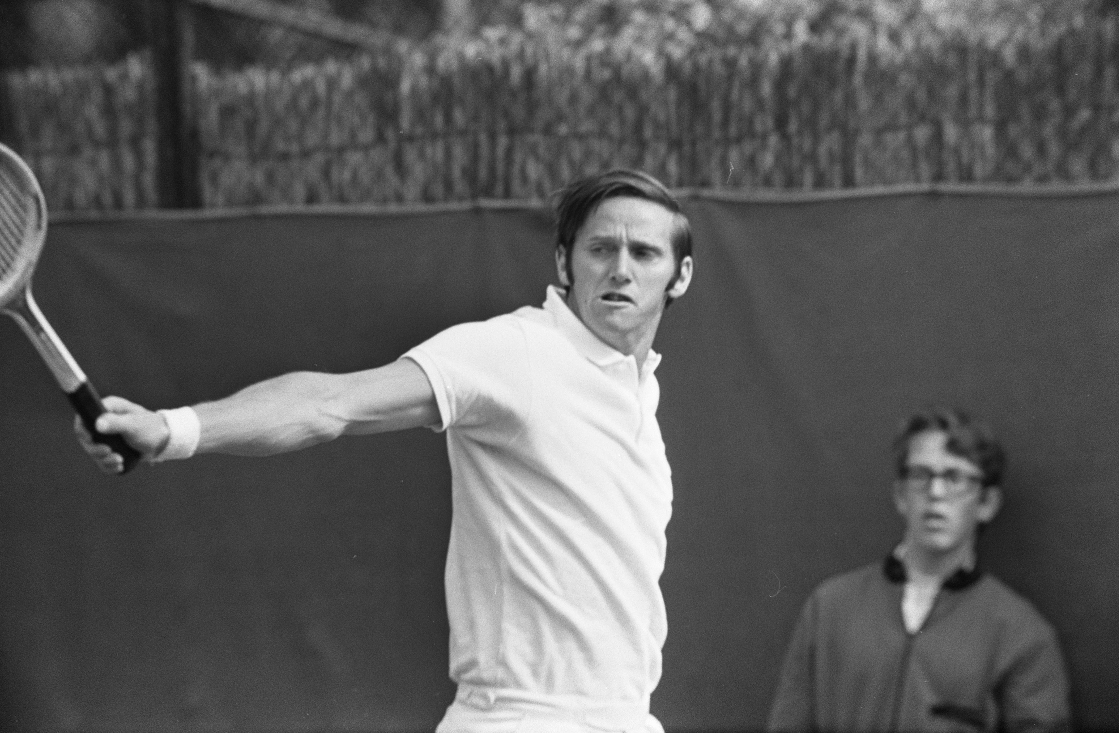 Collectie / Archief : Fotocollectie Anefo Reportage / Serie : [ onbekend ] Beschrijving : Tennis Amsterdam Roy Emerson in aktie Datum : 23 mei 1969 Locatie : Amsterdam, Noord-Holland Trefwoorden : TENNIS Persoonsnaam : Roy Emerson Fotograaf : Koch, Eric / Anefo Auteursrechthebbende : Nationaal Archief Materiaalsoort : Negatief (zwart/wit) Nummer archiefinventaris : bekijk toegang 2.24.01.05 Bestanddeelnummer : 922-4539